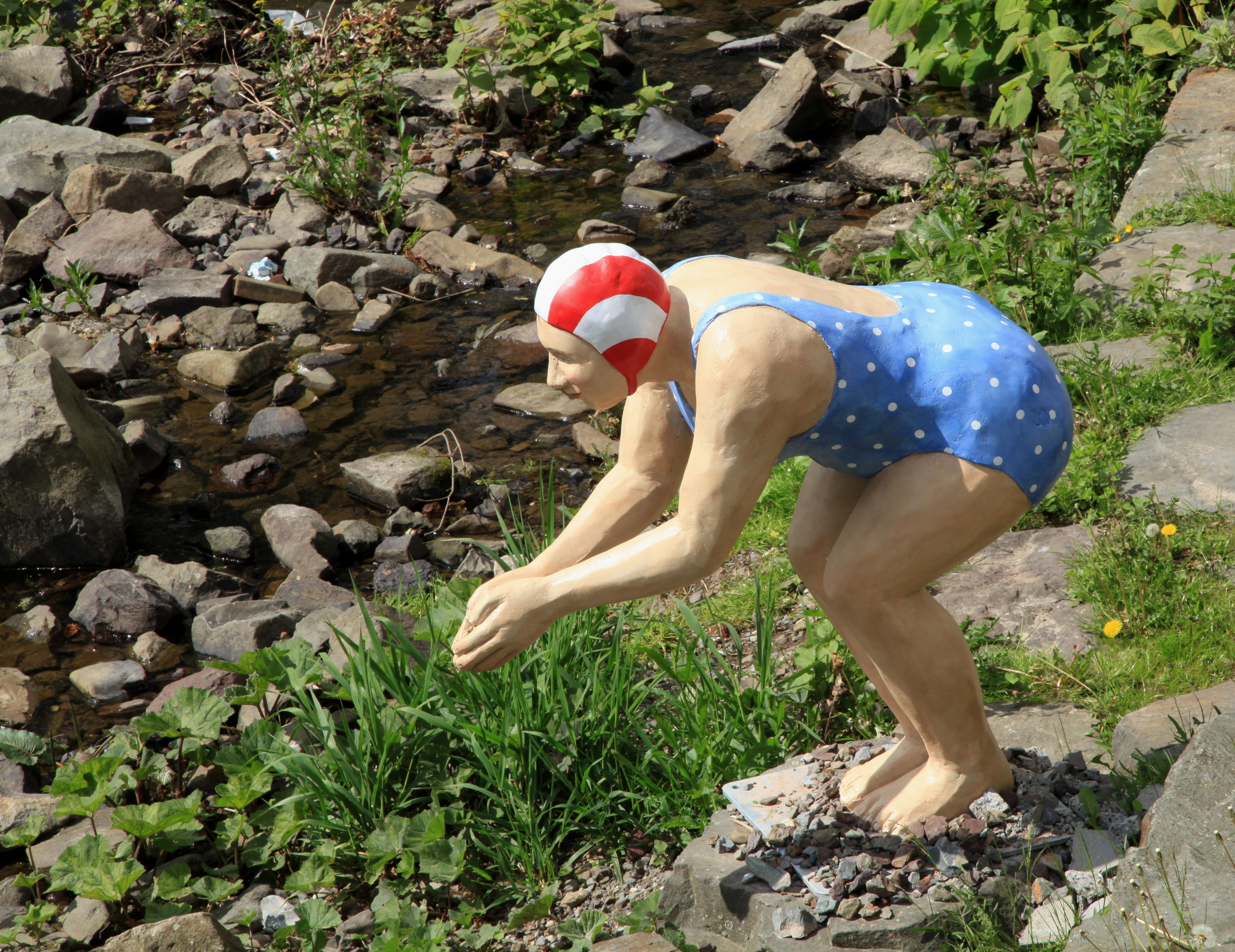 Alltagsmenschen von Christel Lechner, Mittelstraße in Gevelsberg. Nachdem einige Alltagsmenschen "auf Probe" in Gevelsberg standen, sind diese hier nun dauerhaft in der Stadt (FoP).